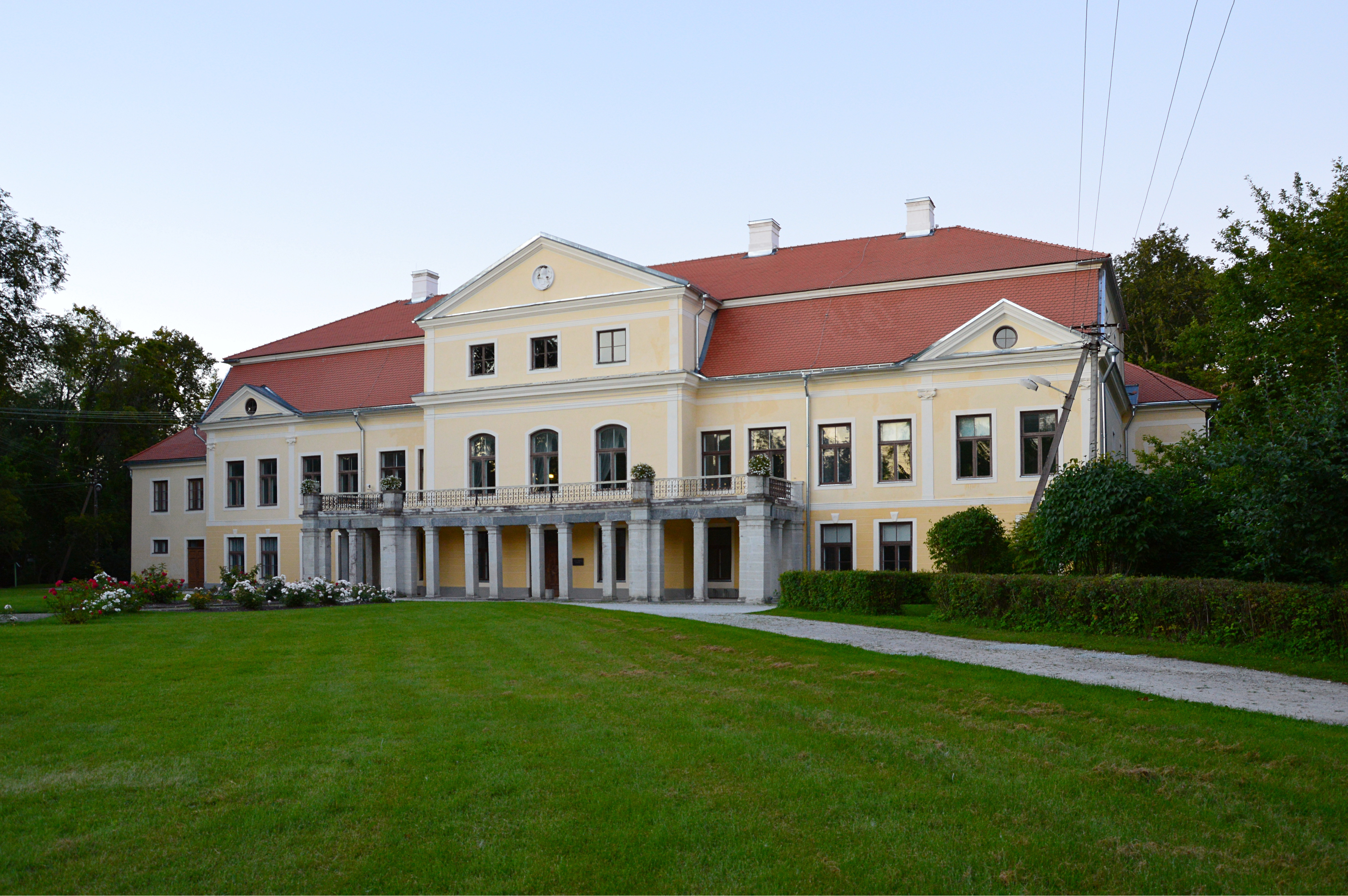 Vana-Vigala mõisa peahoone.